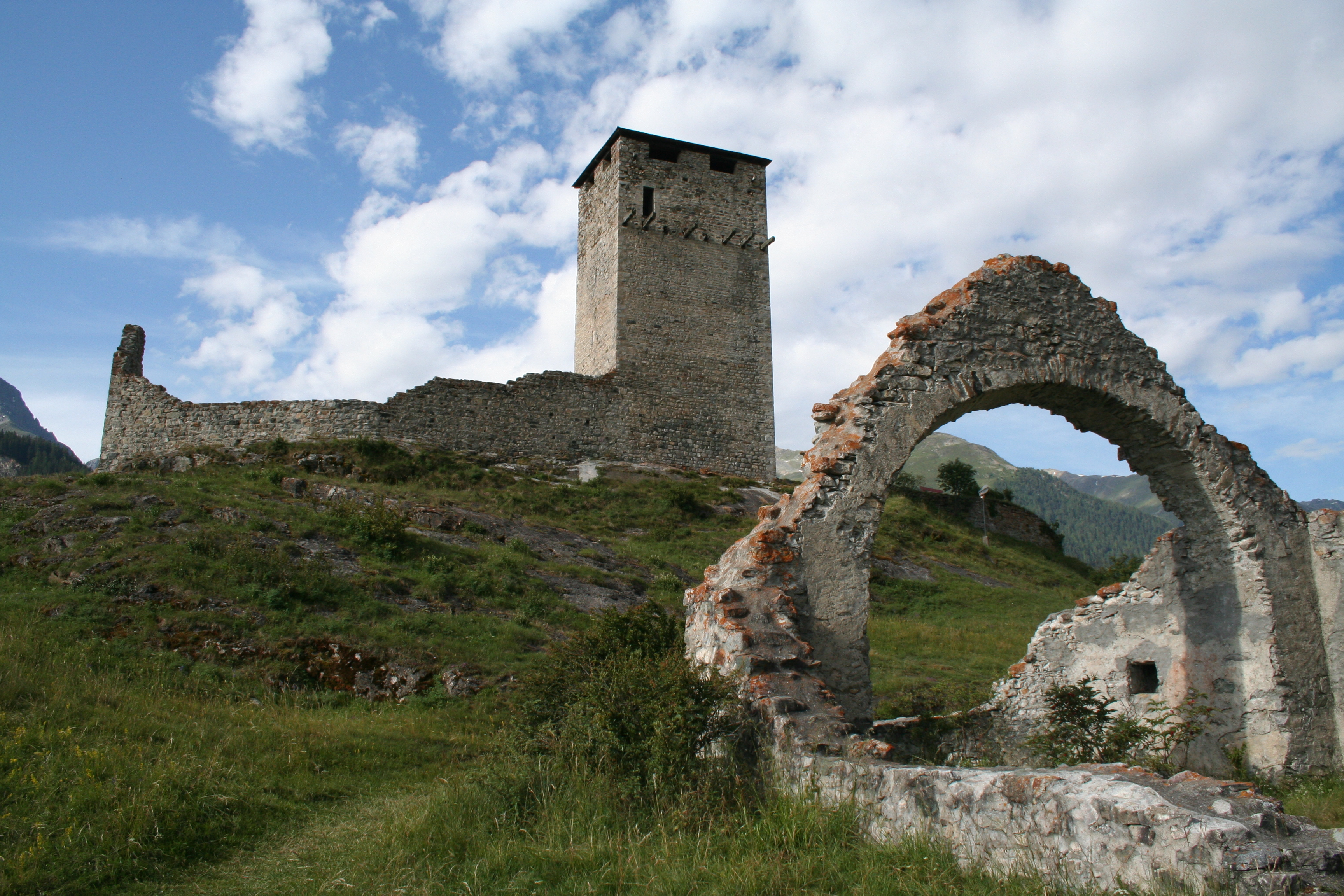 Ruine Steinsberg, Kirche St. Luzius